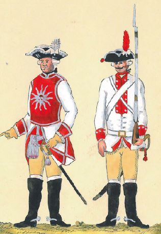 22. Regiment konny dragonów w paradnej kamizelce i kolecie (oficer i szeregowy Gwardii Konnej Koronnej w stroju paradnym)